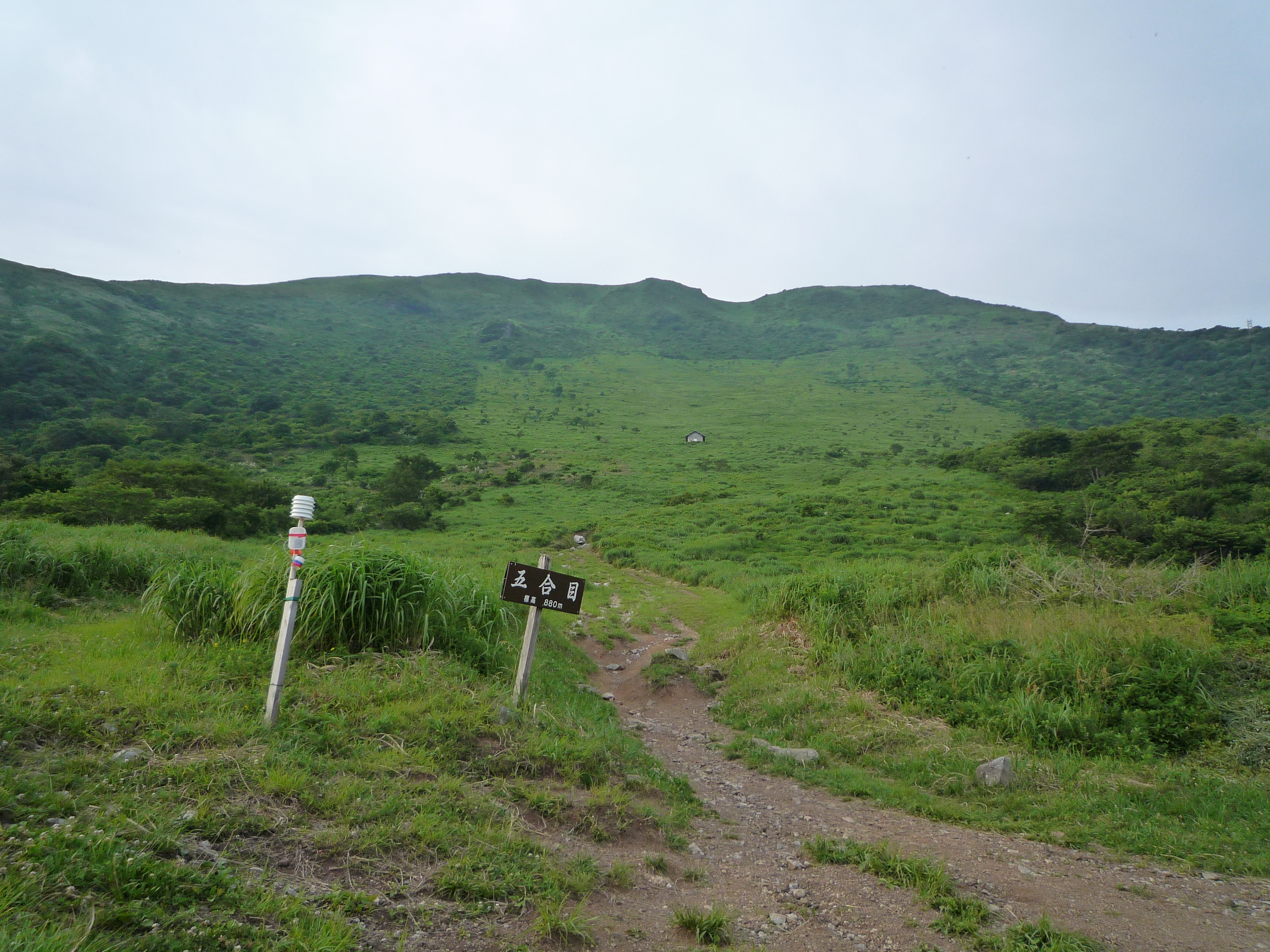 伊吹山五合目。